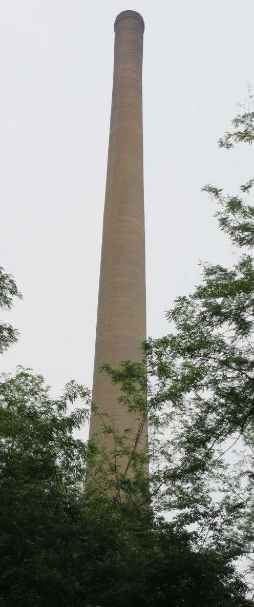 宮古市にあるラサ工業の煙突